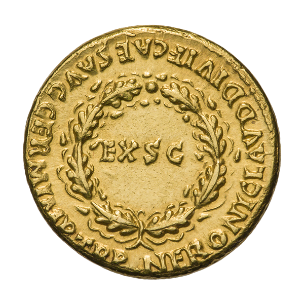 Ауреус. Агриппина Младшая и Нерон. Ок. 54 г. (реверс). Круговая надпись NERONI CLAVD DIVI CAES AVG GERM IMP TR P. Внутри дубового венка EXSC.